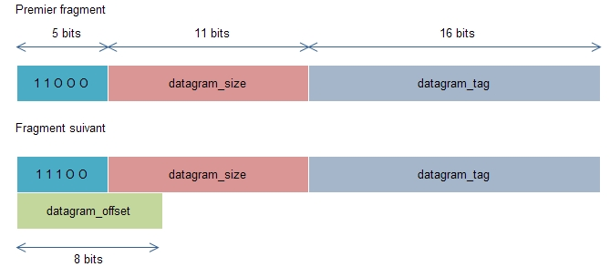 en-tête de fragmentation 6LoWAPN